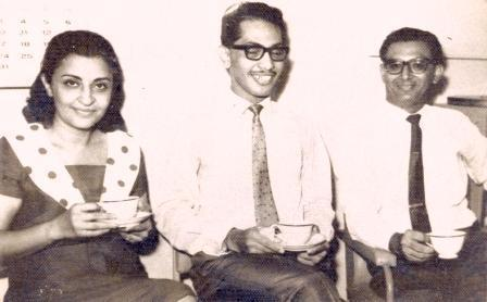 الصافي يتوسط طه امان ماهية نجيب